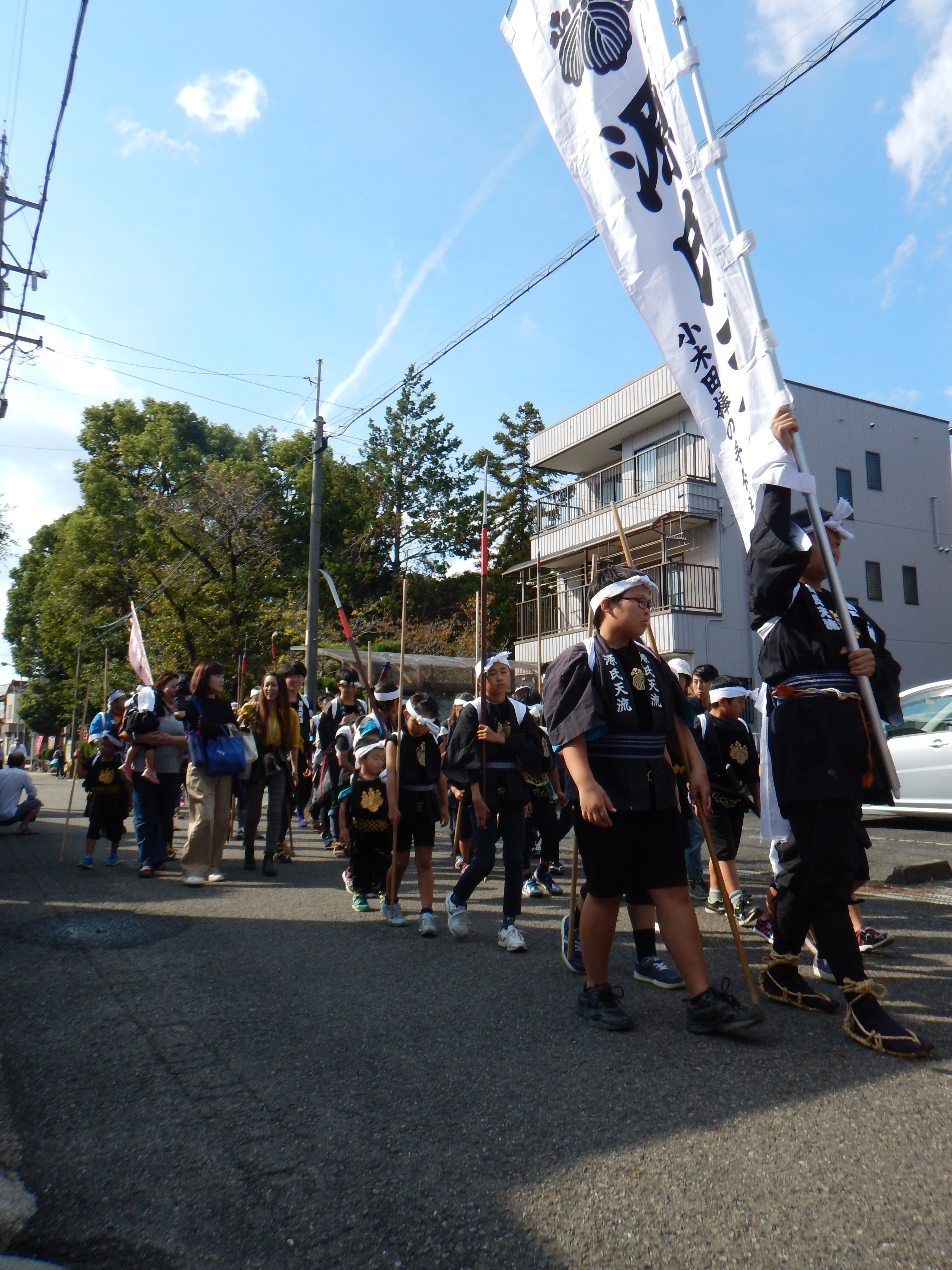 小木田の棒の手の行進の様子